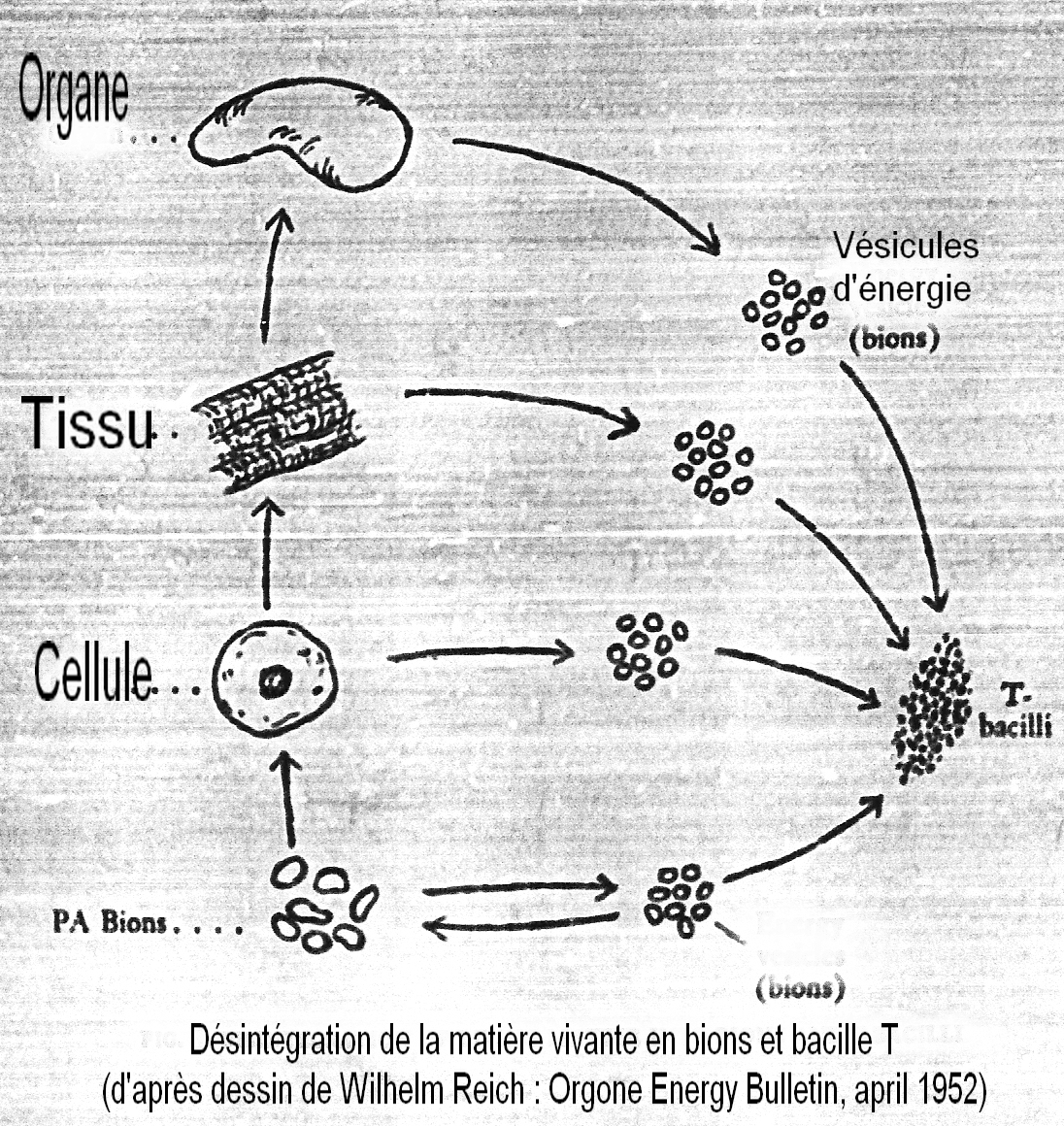 Decomp Bioneuse